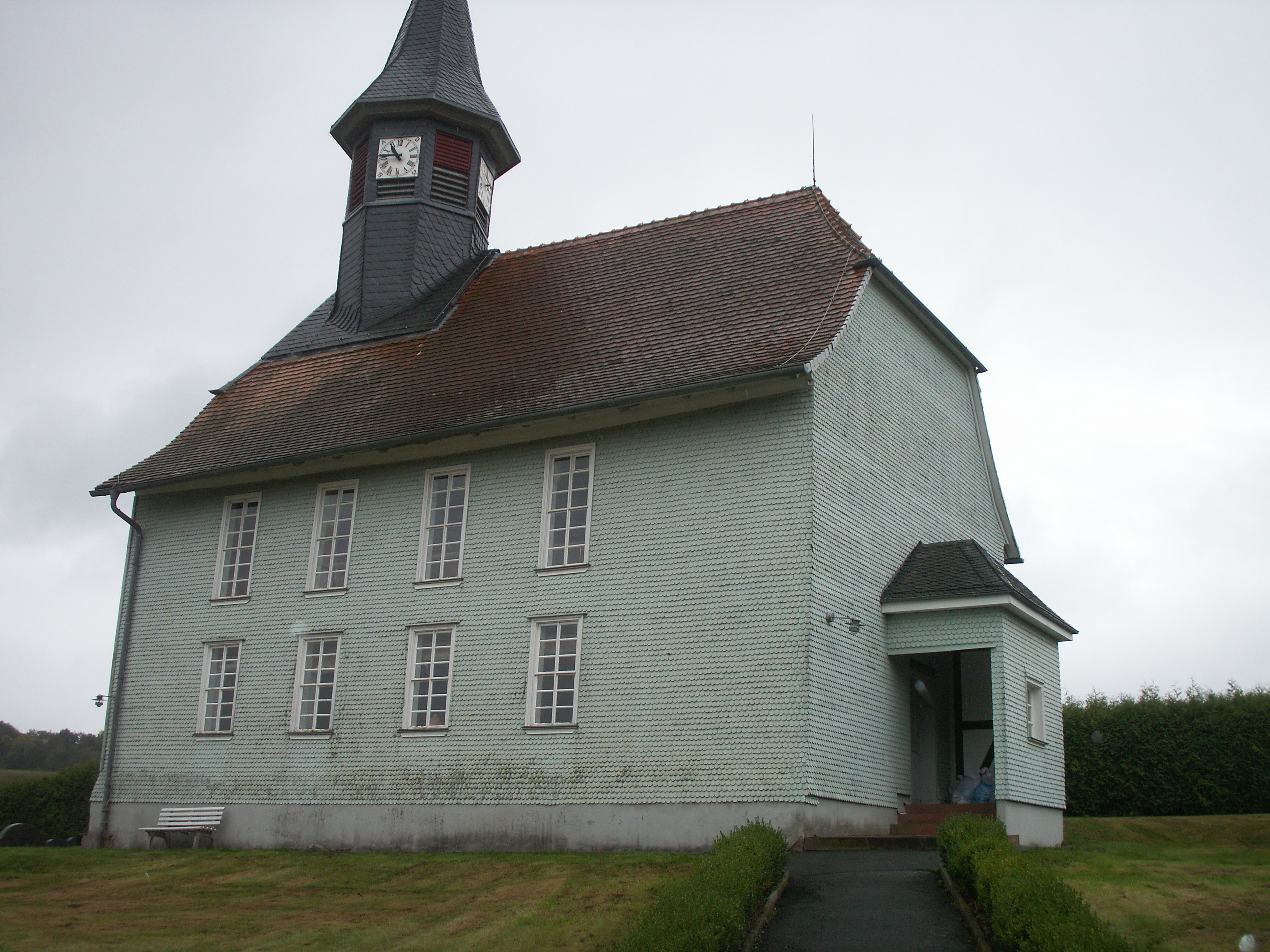 Evangelische Kirche in Schlechtenwegen, Ortsteil von Herbstein